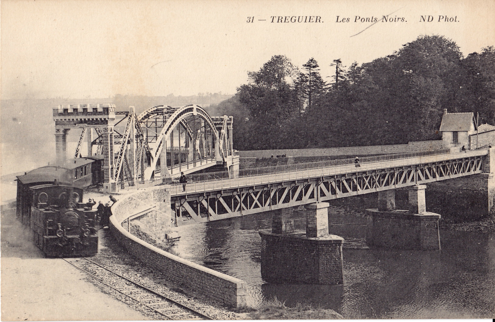 Carte postale ancienne éditée par ND, n°31 :TREGUIER - Les Ponts-Noirs